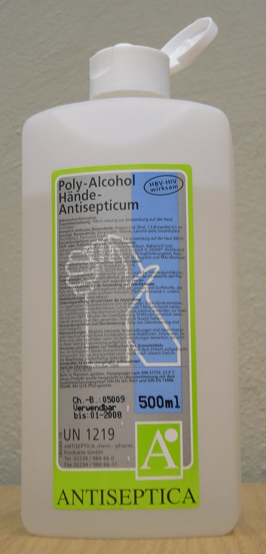 Lösung zur Hautdesinfektion